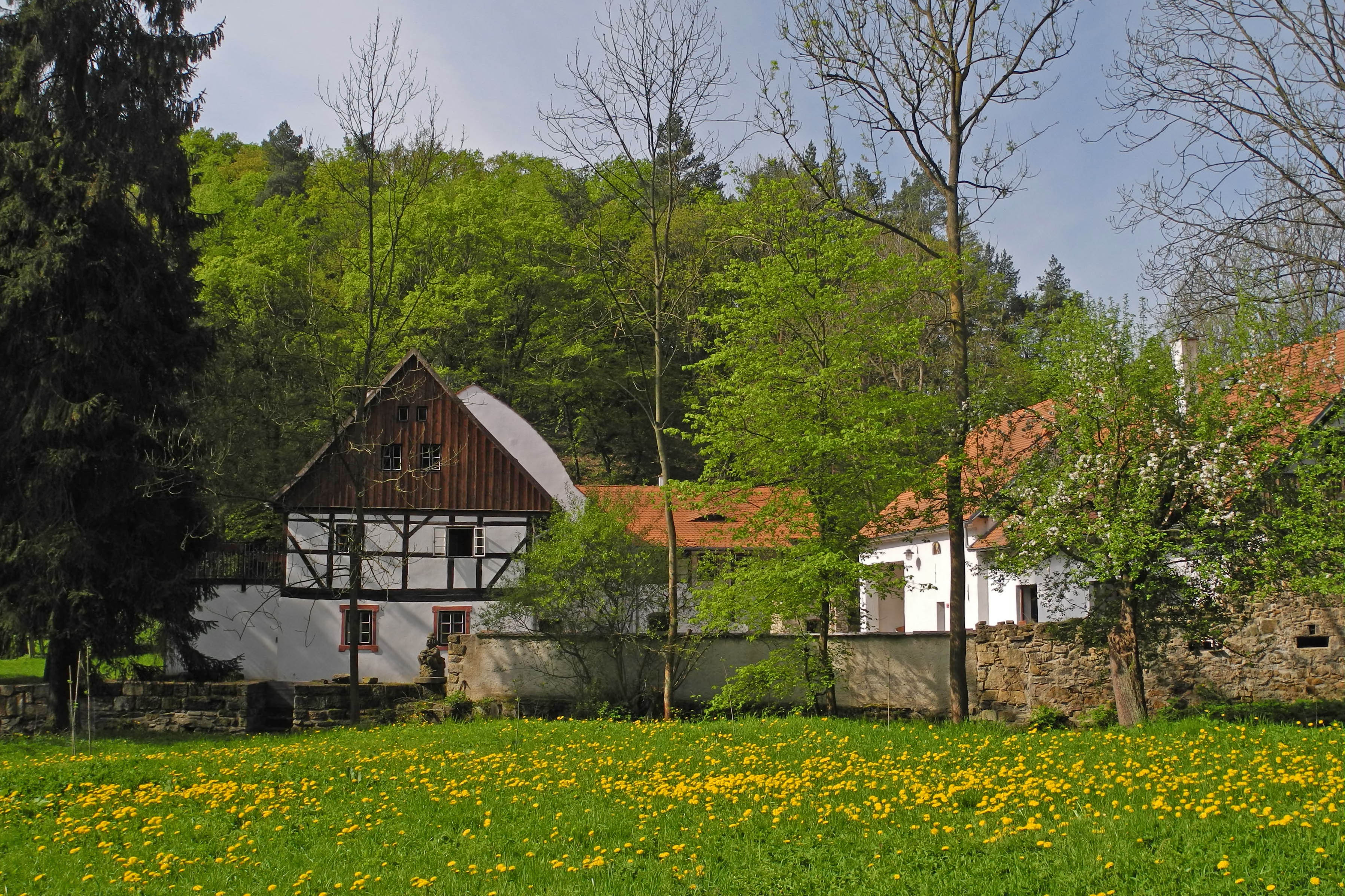 Wopparner Tal (Opárenské údolí) – Konradsmühle (Konrádův mlýn), jetzt Opárenský mlýn. Im Juni 2011 vom tschechischen Jugendverein A-TOM und dem Erzgebirgsverein (EV) als Begegnungs- und Bildungszentrum für deutsche und tschechische Jugendliche eröffnet.